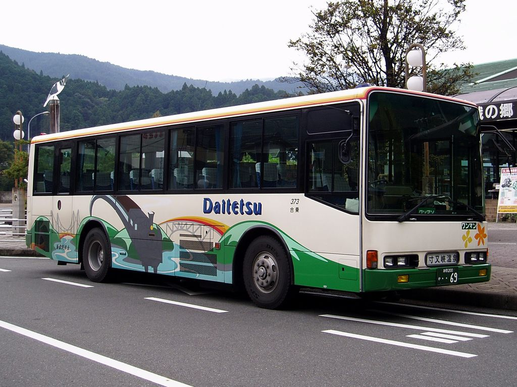 Oigawa Railway Mitsubishi KL-MP35JK at Senzu Sta.